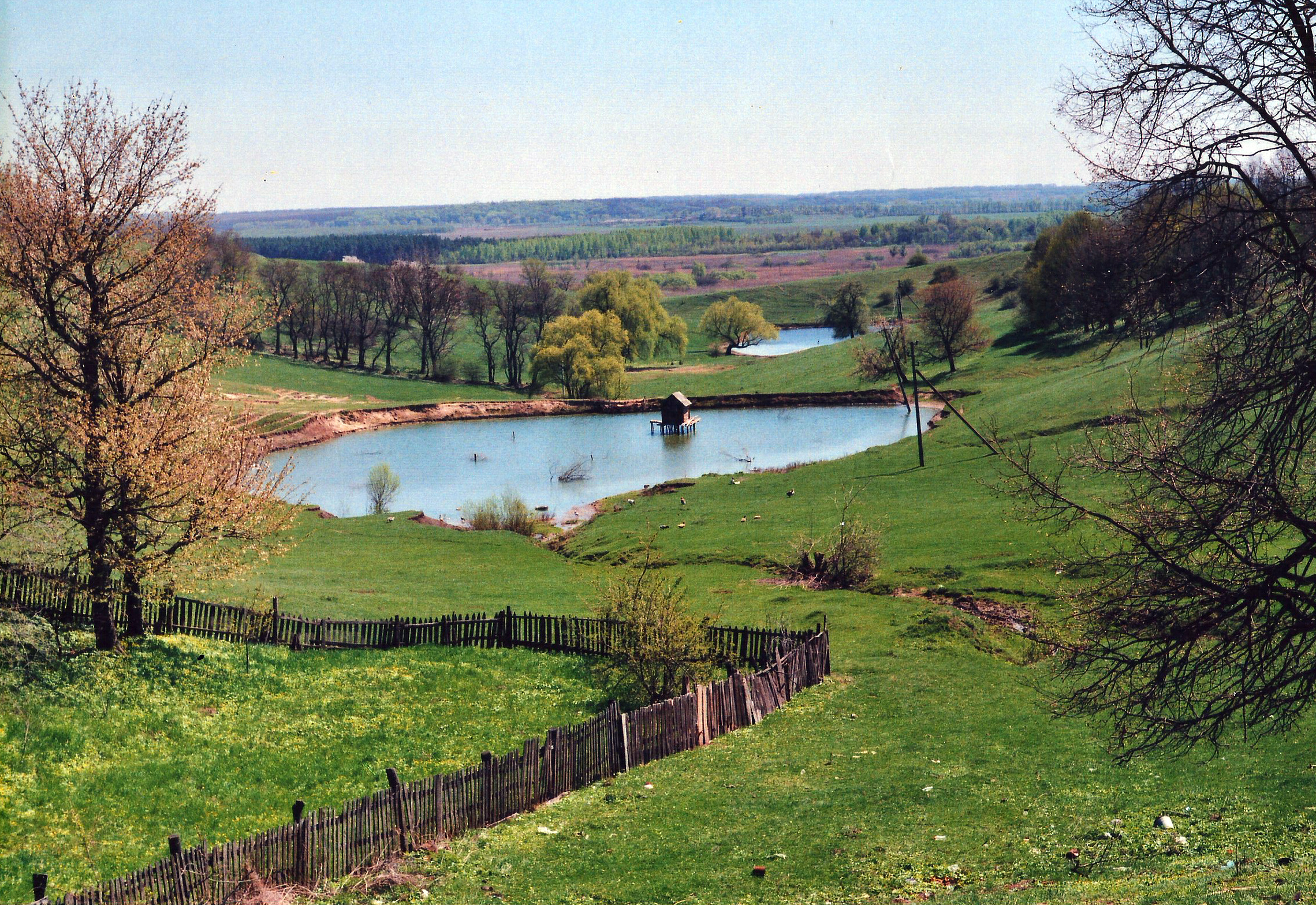 Христанівський, Лохвицький р-н, околиці сіл Христанівка та Бодаква, заплава р. Сула, Лохвицьке л-во, кв. 71 вид. 1-21